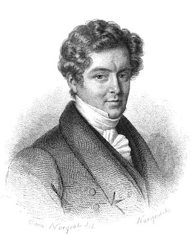 Jean-Denis-Marie Cochin